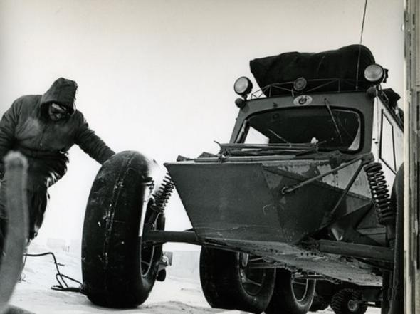 Вездеход Арктика — вездеход-амфибия на шинах сверхнизкого давления, производился ассоциацией Арктиктранс.